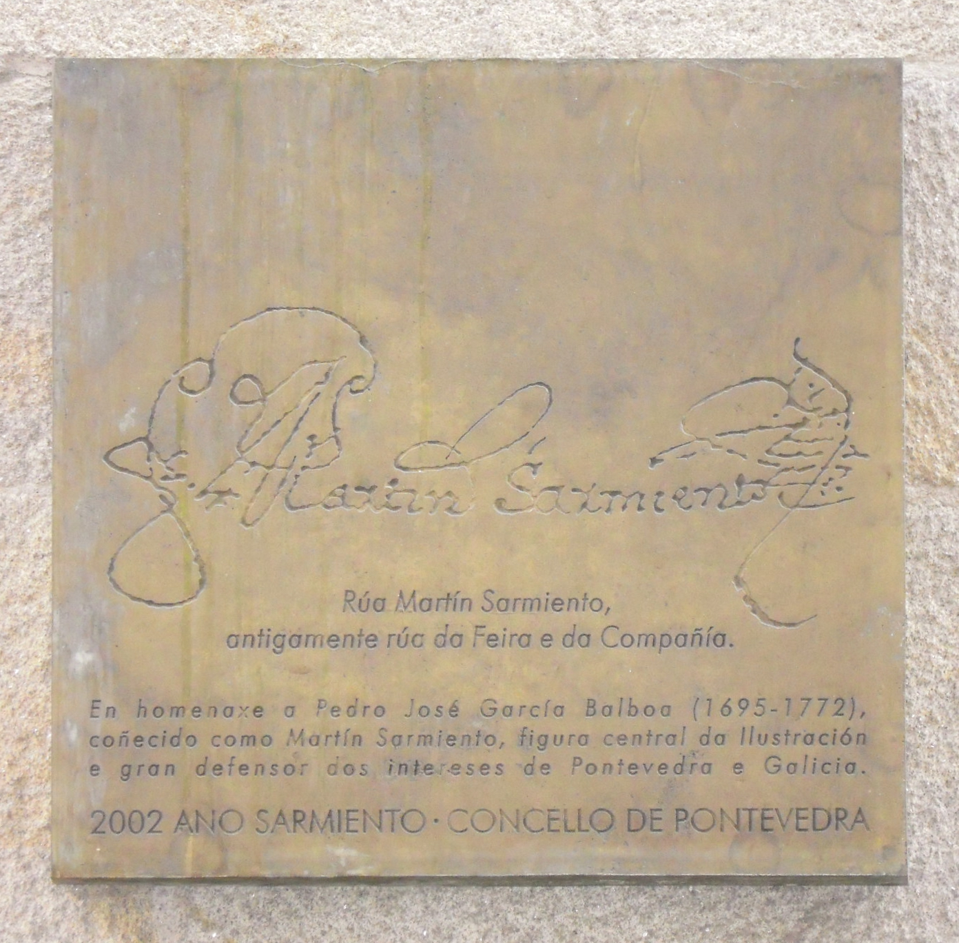 Placa na rúa de Frei Martín Sarmiento de Pontevedra, en homenaxe ao relixioso e escritor, coa súa sinatura e co seguinte texto:Rúa Martín Sarmiento,antigamente rúa da Feira e da Compañía.En homenaxe a Pedro José García Balboa (1695-1772),coñecido como Martín Sarmiento, figura central da Ilustracióne gran defensor dos intereses de Pontevedra e Galicia.2002 ANO SARMIENTO · CONCELLO DE PONTEVEDRA